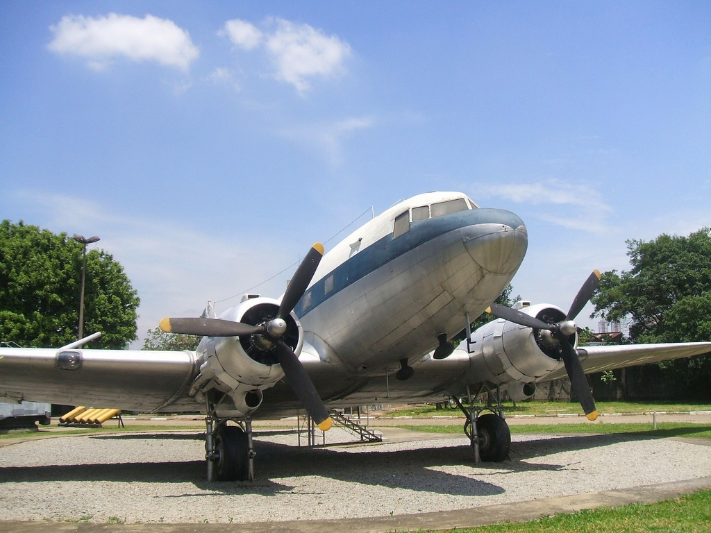 Avião Douglas DC-3 (Douglas C-47 B-45). Fabricado em Santa Mônica, Califórnia, EUA. Adquirido pela VASP em janeiro de 1946, com o nome de "Caparaó". Doado para a fundação Projeto Rondon (1974) e pela fundação para o Museu da Tecnologia, em 1980. Acervo do Museu da Tecnologia de São Paulo (São Paulo, Brasil).